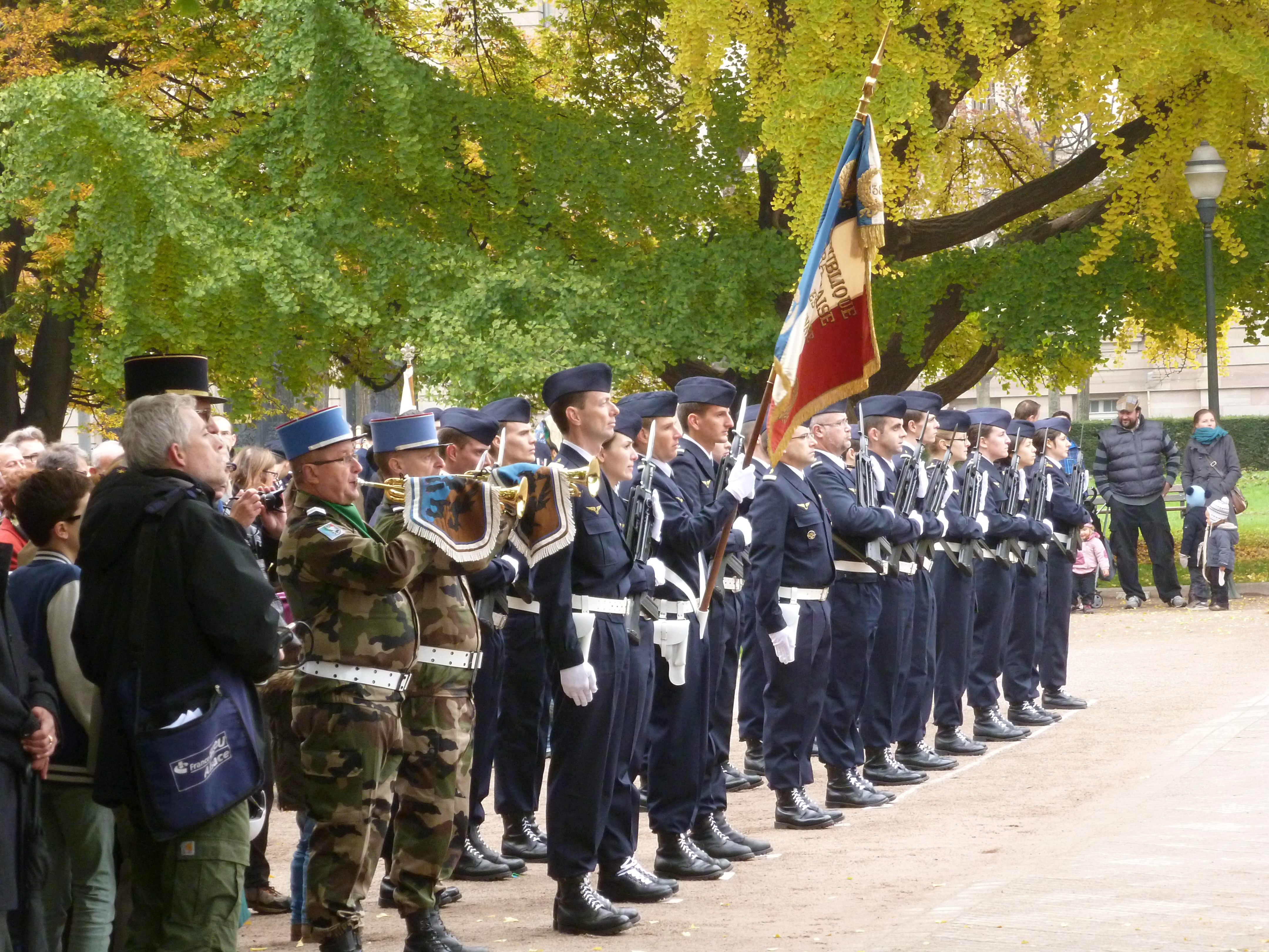 Drapeau et garde de la base aérienne 901 Drachenbronn, lors de la cérémonie du 11 novembre 2014, place de la République à Strasbourg.